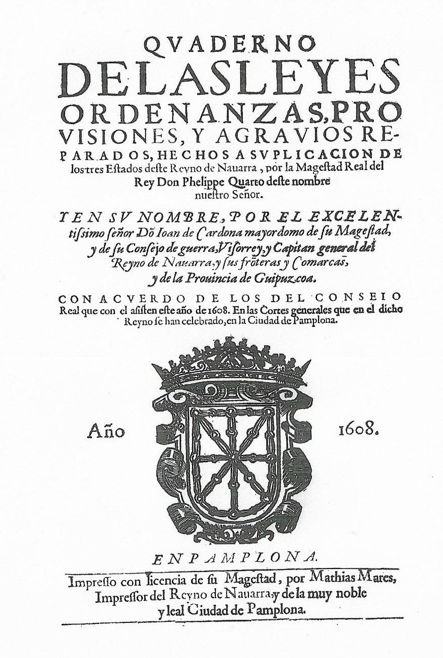 Cuaderno de las Leyes de las Cortes del Reino de Navarra, 1608, impresas por Matías Mares, en Pamplona, en 1608